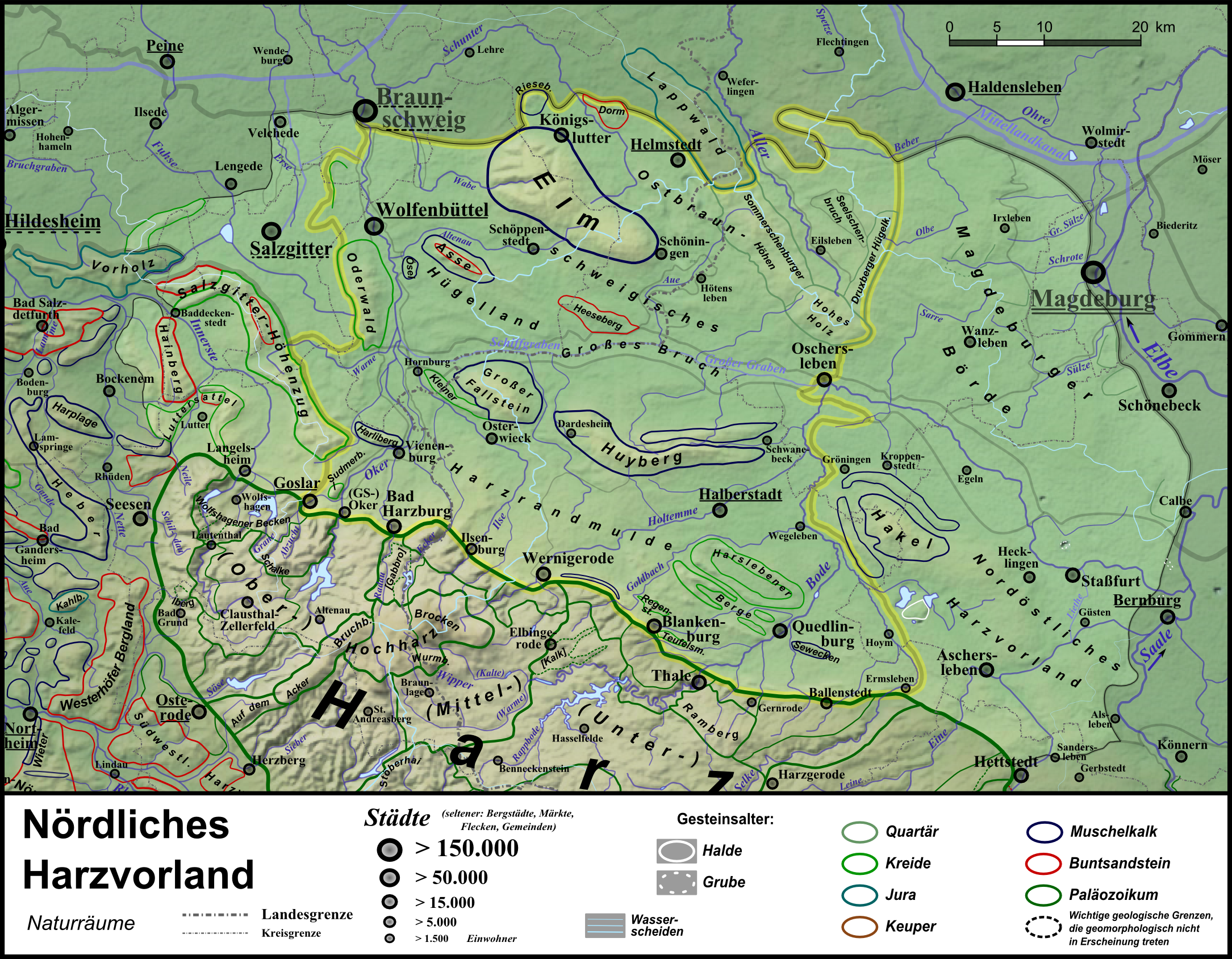 Naturraumkarte des Nördlichen Harzvorlandes (Ostbraunschweigisches Hügelland im Norden, Großes Bruch zentral, Harzrandmulde im Süden) und ihres Umlandes. Aufgehellt sind ebenfalls die Nachbarlandschaften Lebenstedter Börde im weiteren Sinne (520.5—520.8 sowie 512.00, siehe Braunschweig-Hildesheimer Lößbörde; nördlicher Westen), Ringelheimer Bergland (379.2, siehe Innerstebergland; südlicher Westen), Magdeburger Börde (504, nördlicher Osten), Bodeniederung (503; zentraler Osten) und Nordöstliches Harzvorland (502; Südosten).